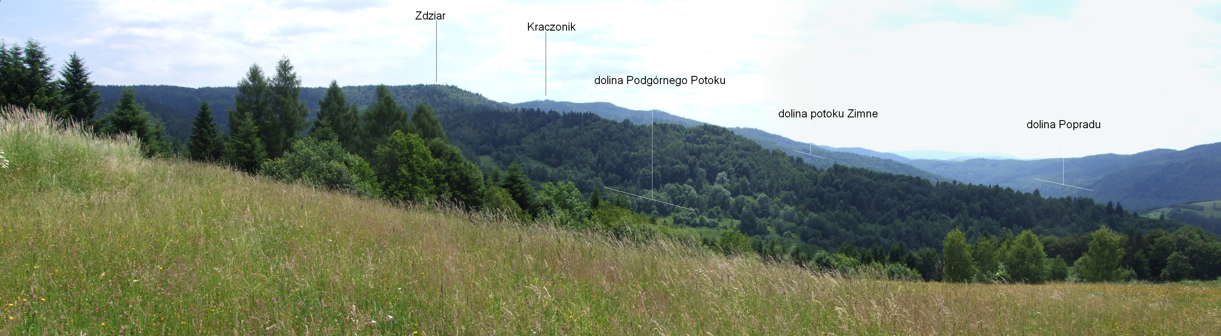 Widok ze stoków Malnika nad Muszyną